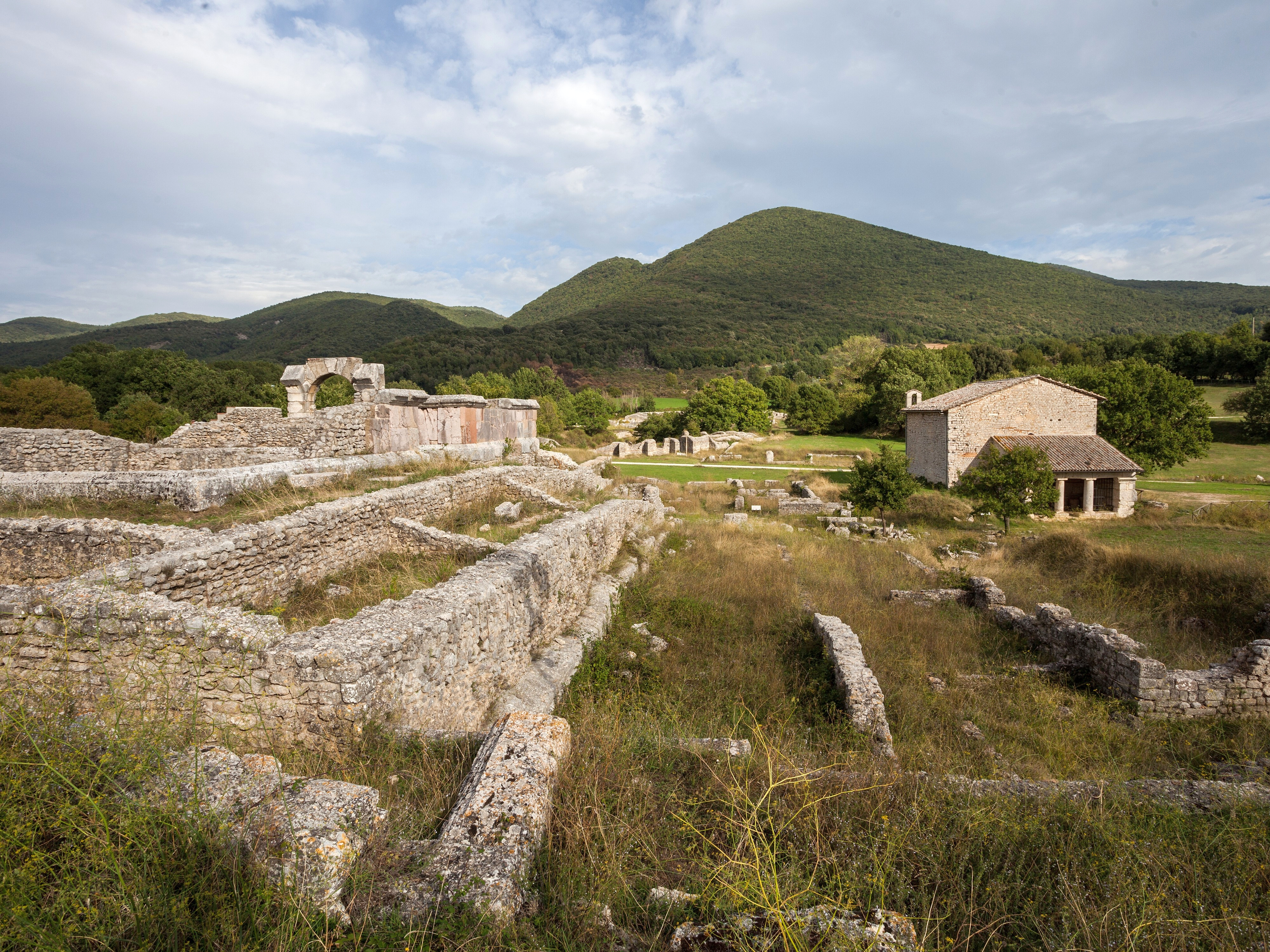 Area Archeologica di Carsulae - MIBAC This is a photo of a monument which is part of cultural heritage of Italy.